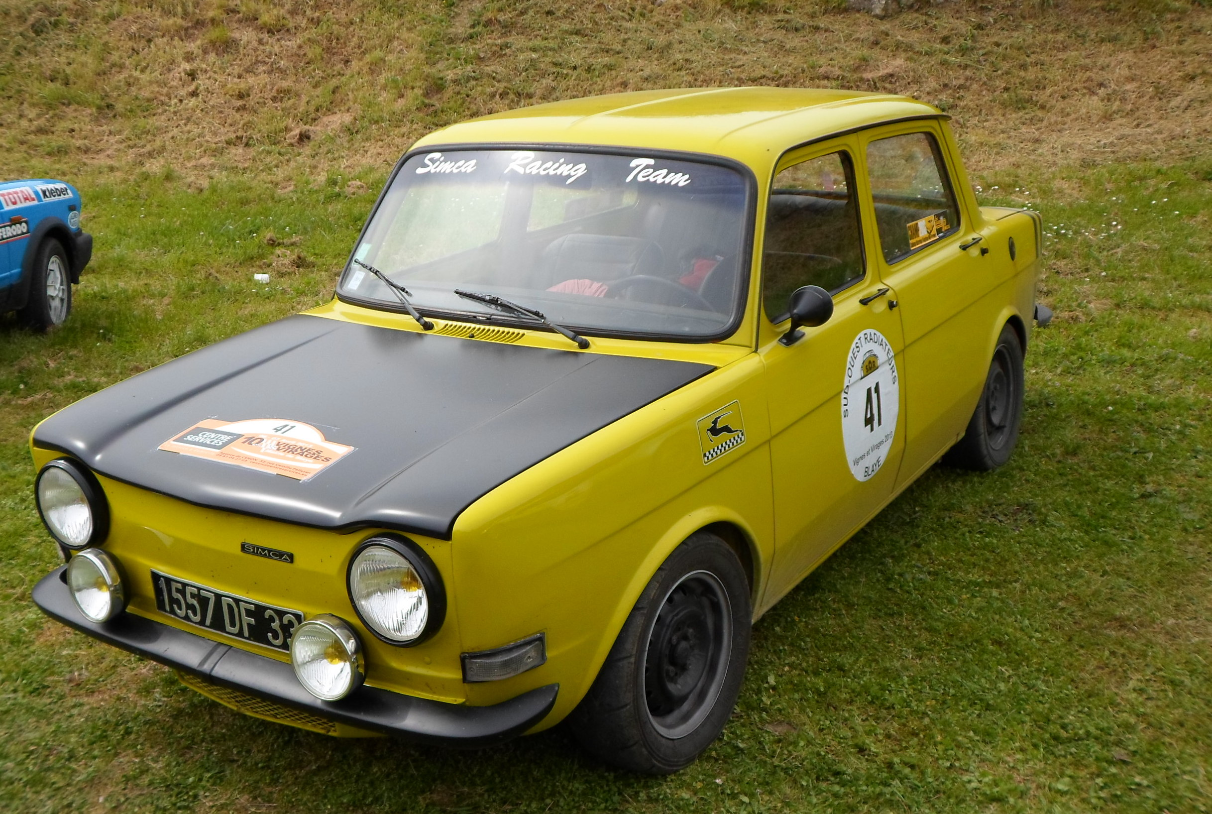 Simca 1000 Rallye 2 Blaye 2013